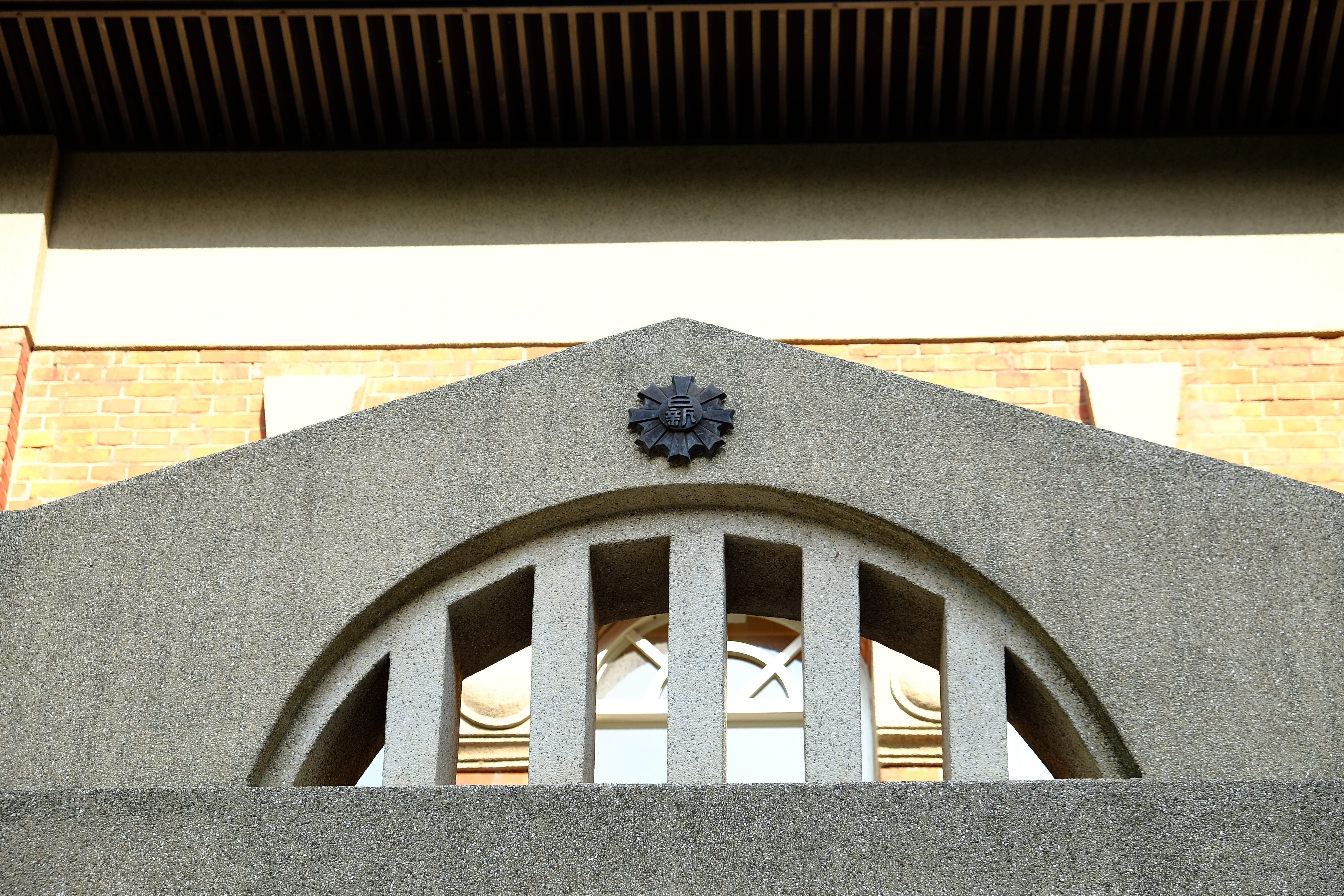 臺北市大同區日新國民小學 Taipei Municipal Rixin Elementary School